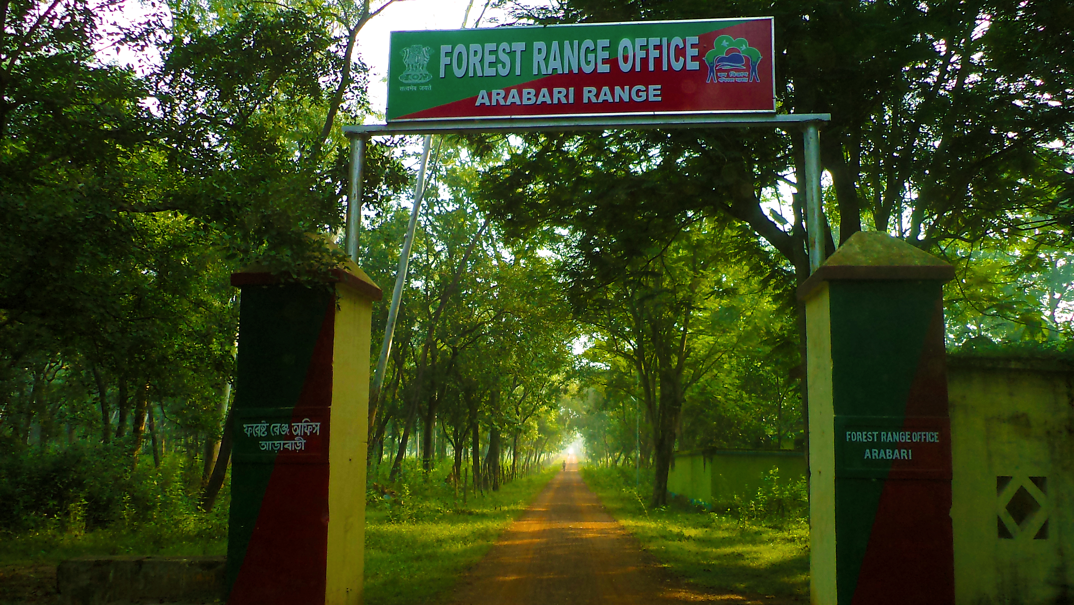 আরাবারি বনাঞ্ছল ও গবেসনা কেন্দ্র